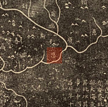 粵語: 華夷圖中嘅恩州